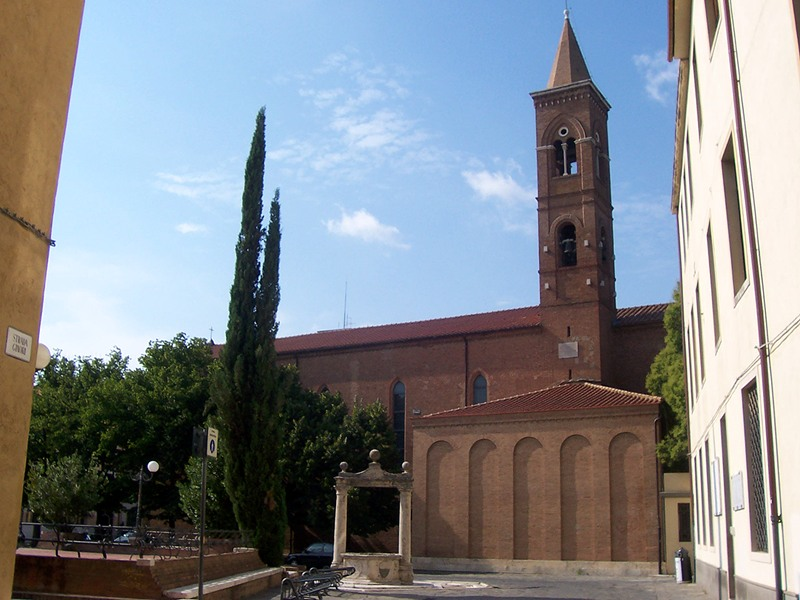 Grosseto - Chiesa di S. Francesco